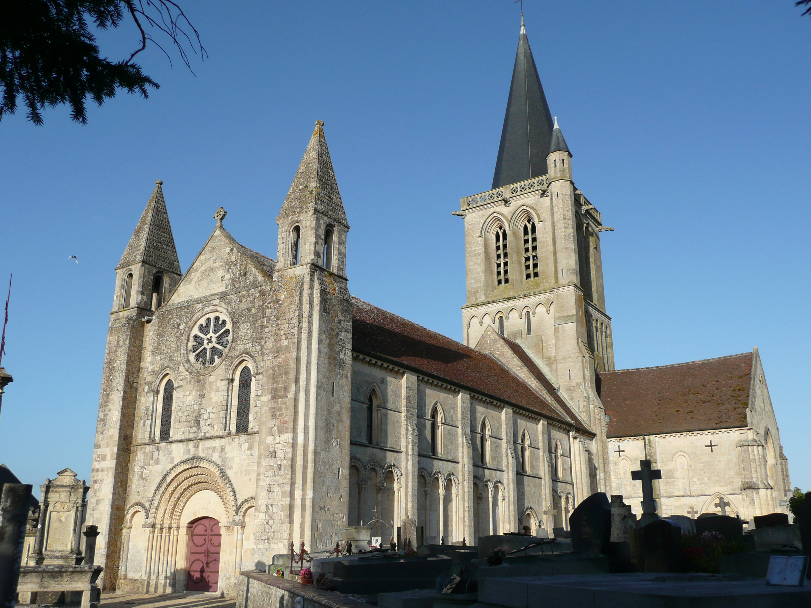 Église de Rots